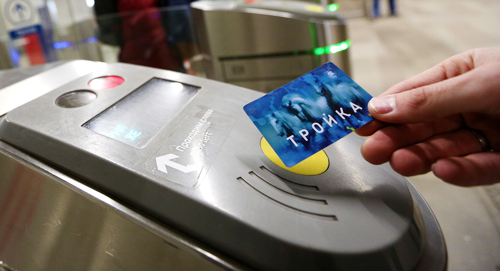 Карта тройка, поднесённая к валидатору турникета Московского метро